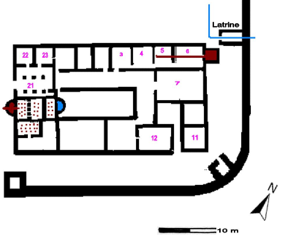 Skizze des spätantiken Kommandantenhaus von Kastell Arbeia/South Shields (GB)